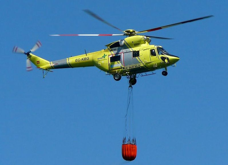 Sokol W-3